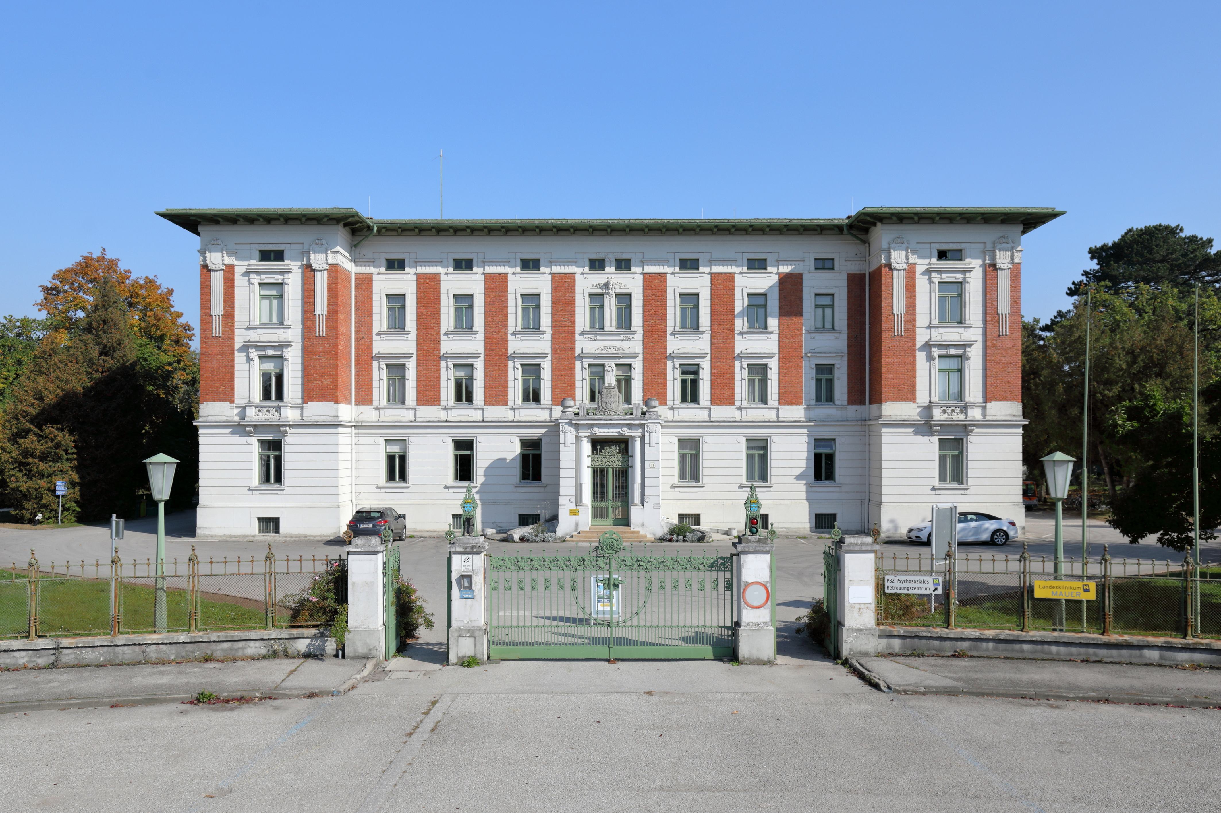 Das Haupt- bzw. Verwaltungsgebäude des Landesklinikums in Mauer, ein Ortsteil der niederösterreichischen Stadt Amstetten.Das niederösterreichische Landeskrankenhaus für Psychiatrie und Neurologie Mauer bei Amstetten wurde von 1898 bis 1902 nach Plänen von Carlo von Boog als Kaiser-Franz-Joseph-Landes-, Heil- und Pflegeanstalt Mauer-Öhling auf einem etwa 100 ha großem Areal in Pavillonstil errichtet.